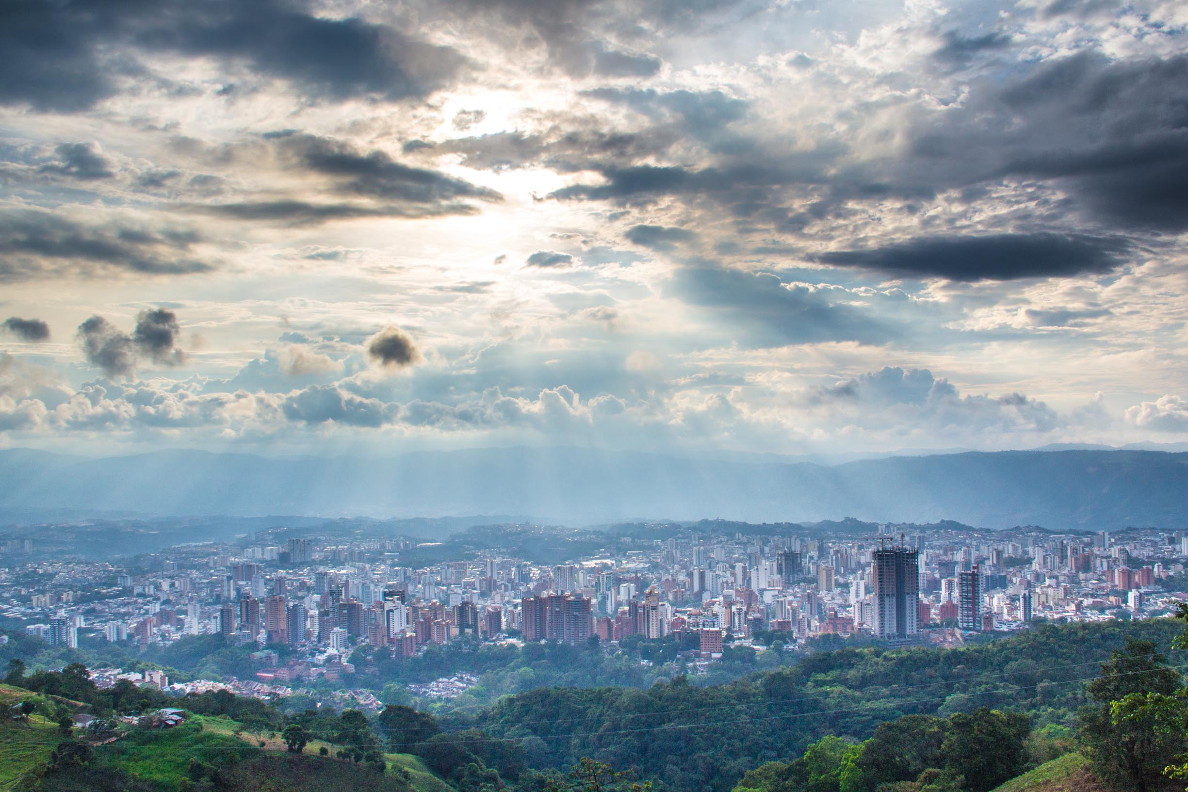 Esta fotografía fue tomada en el municipio colombiano con código 68001.